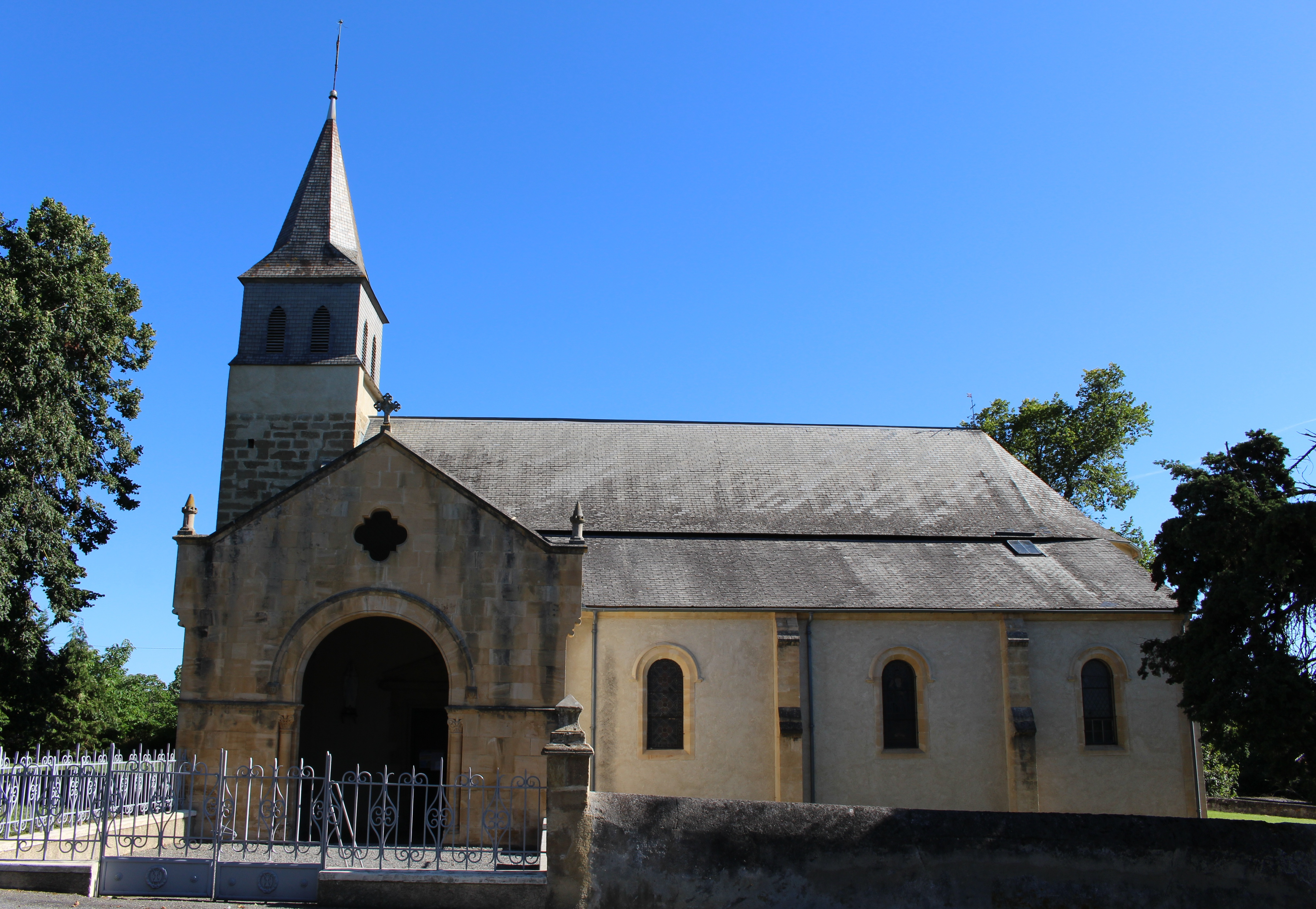 Église Saint-Pierre de Puntous (Hautes-Pyrénées)